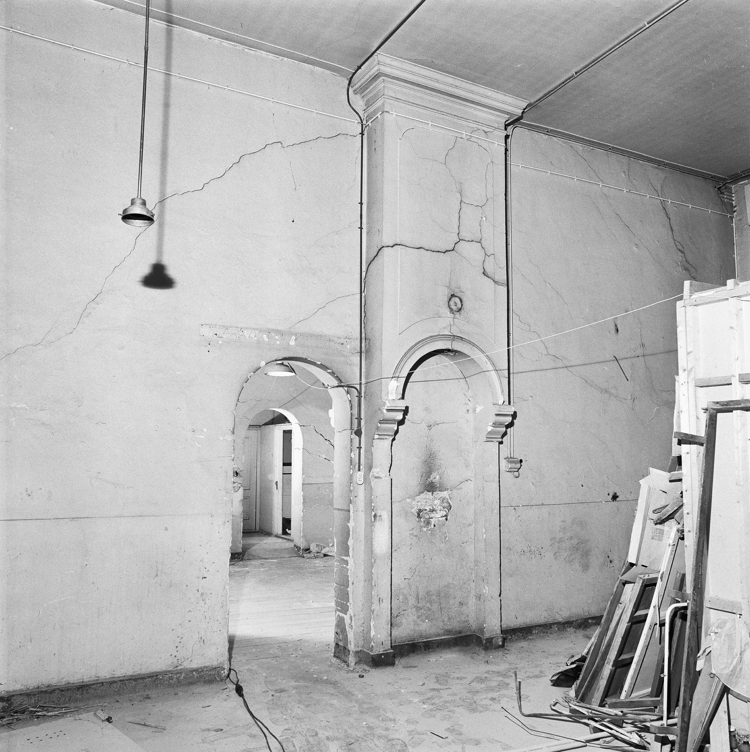 Duitse Huis: INT. HOOFDGEBOUW, BEGANE GROND